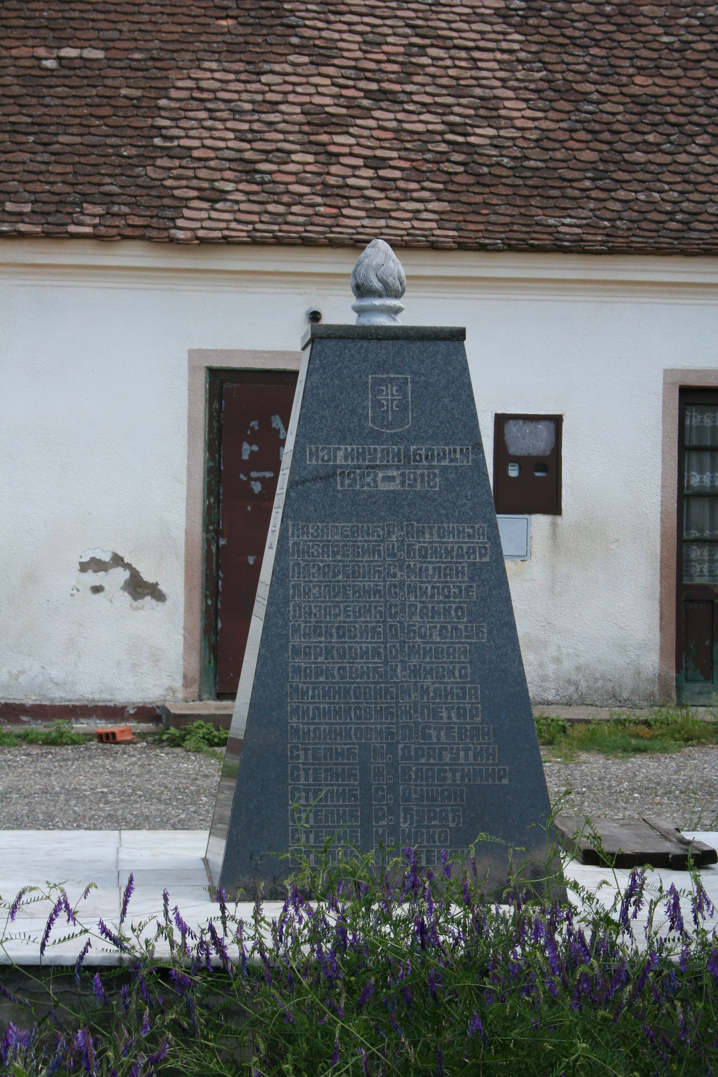 Spomenik palim borcima, Vučevica opština Vladimirci